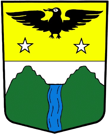 Wappen von Oberems VS